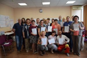 Тренінг "Анімація громадської діяльності"